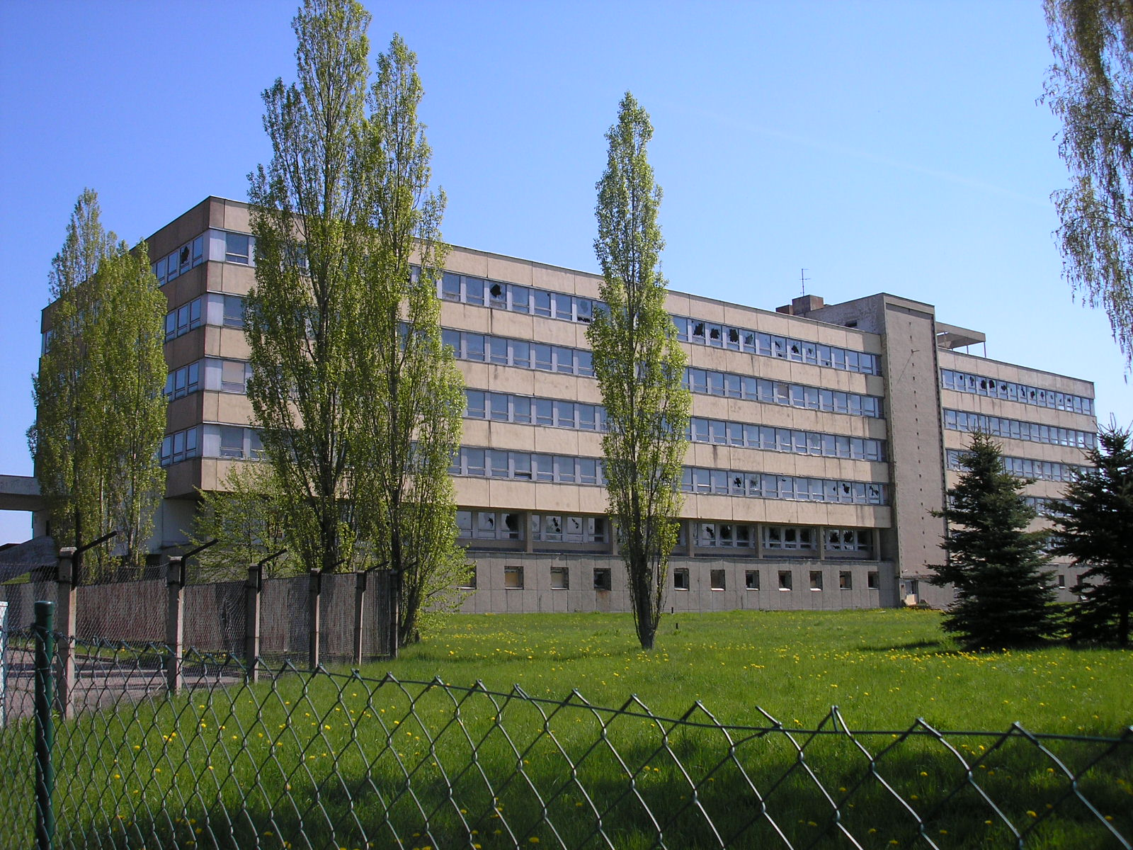 Das ehemalige Verwaltungsgebäude des Ilmenauer Glaswerkes im Industriegebiet am Vogelherd. Es wurde 1972 erbaut und wird seit 1991 nicht mehr genutzt.